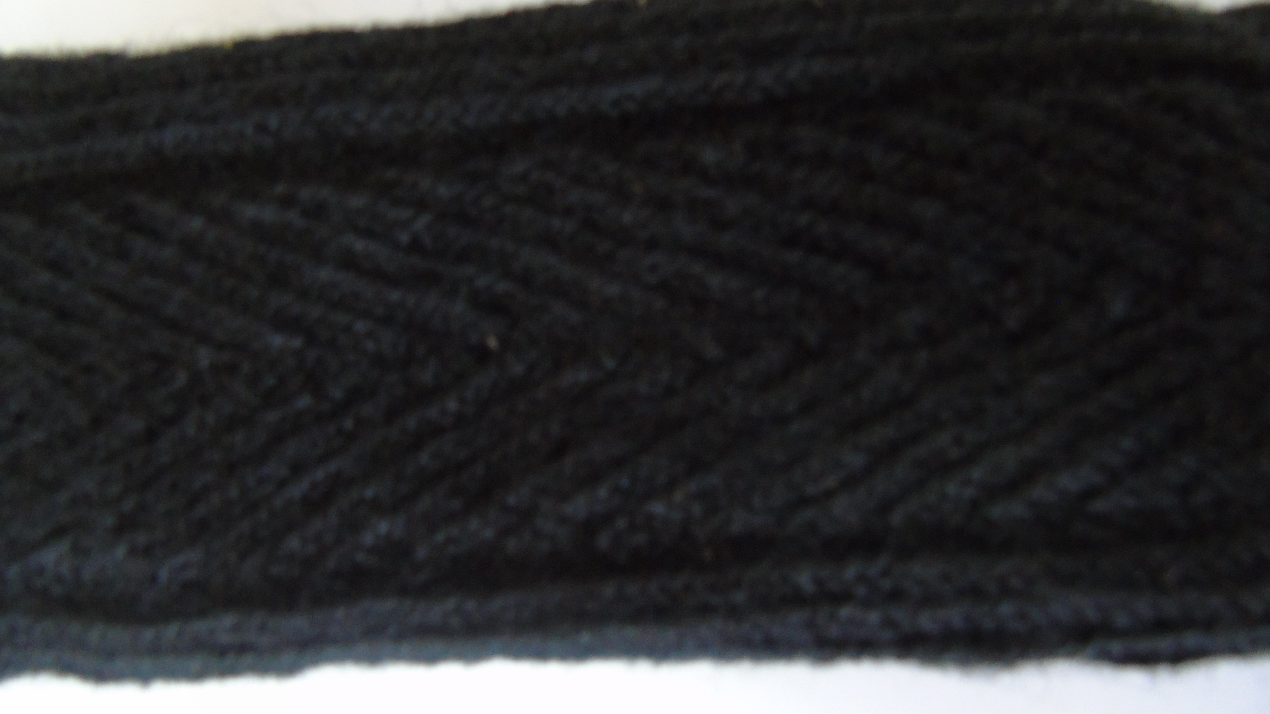 Српски (ћирилица): Мотив плета са црних ручно плетених вунених чарапа из Левча (Збирка чарапа Музеја у Трстенику) 4